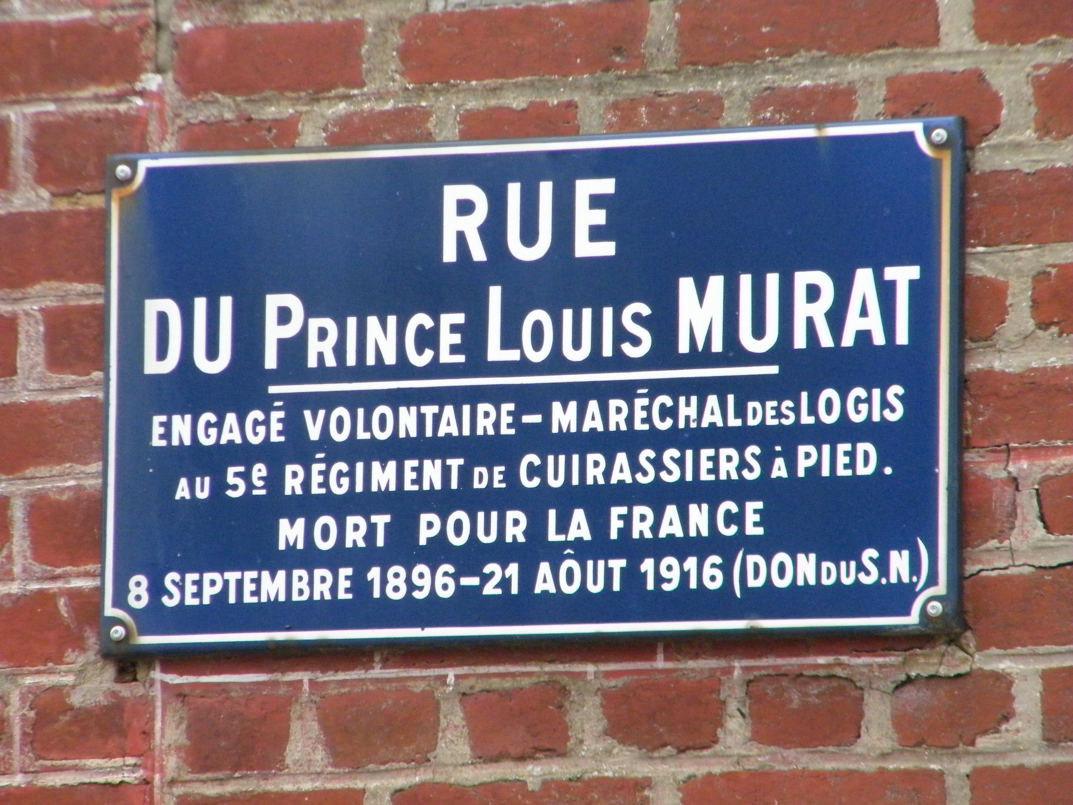 rue Murat